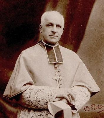 Mgr Paul-Augustin Lecœur, évêque de Saint-Flour (1906-1942).